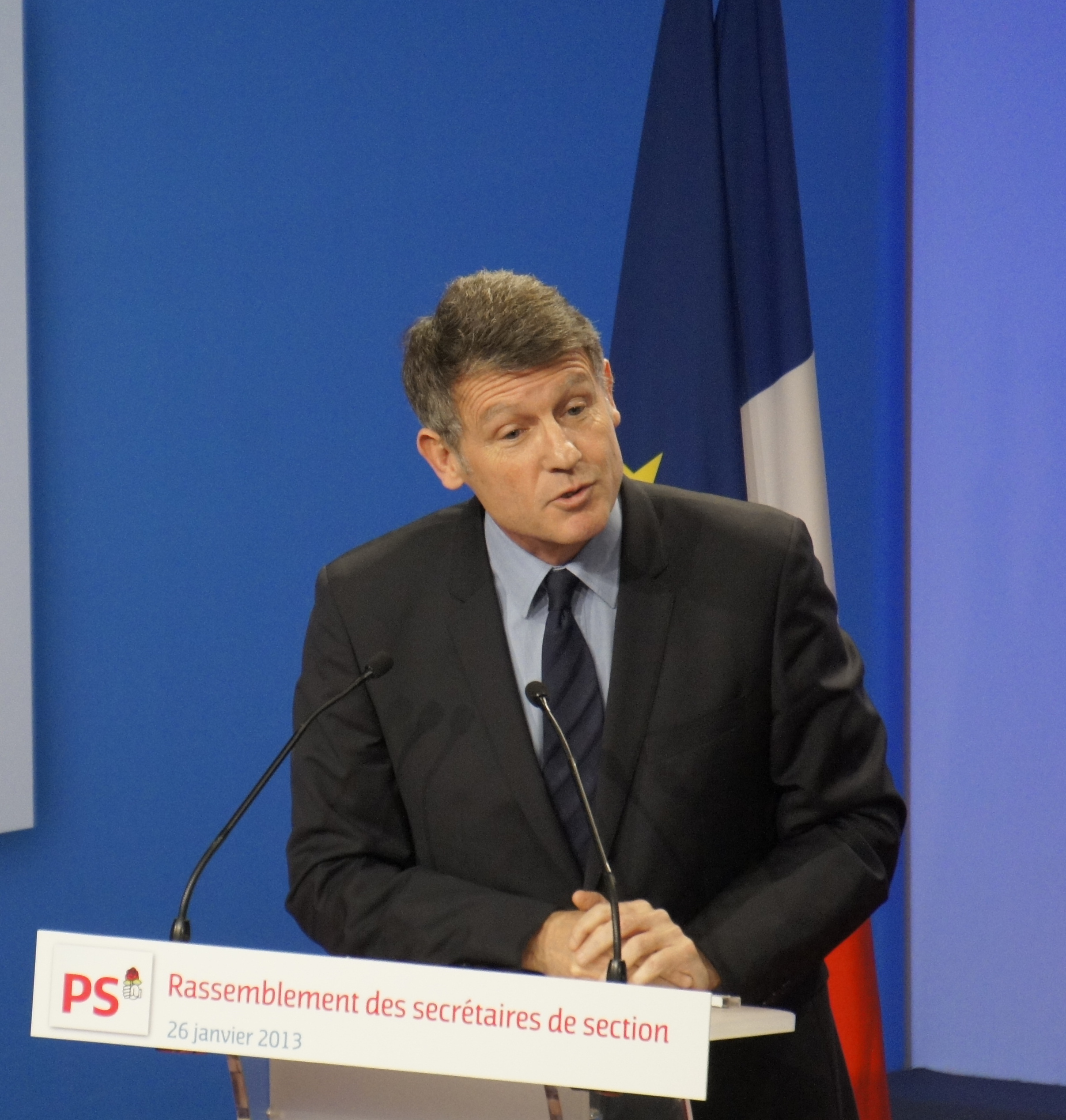 Vincent Peillon prenant la parole à la Maison de la Mutualité le 26 I 2013 .